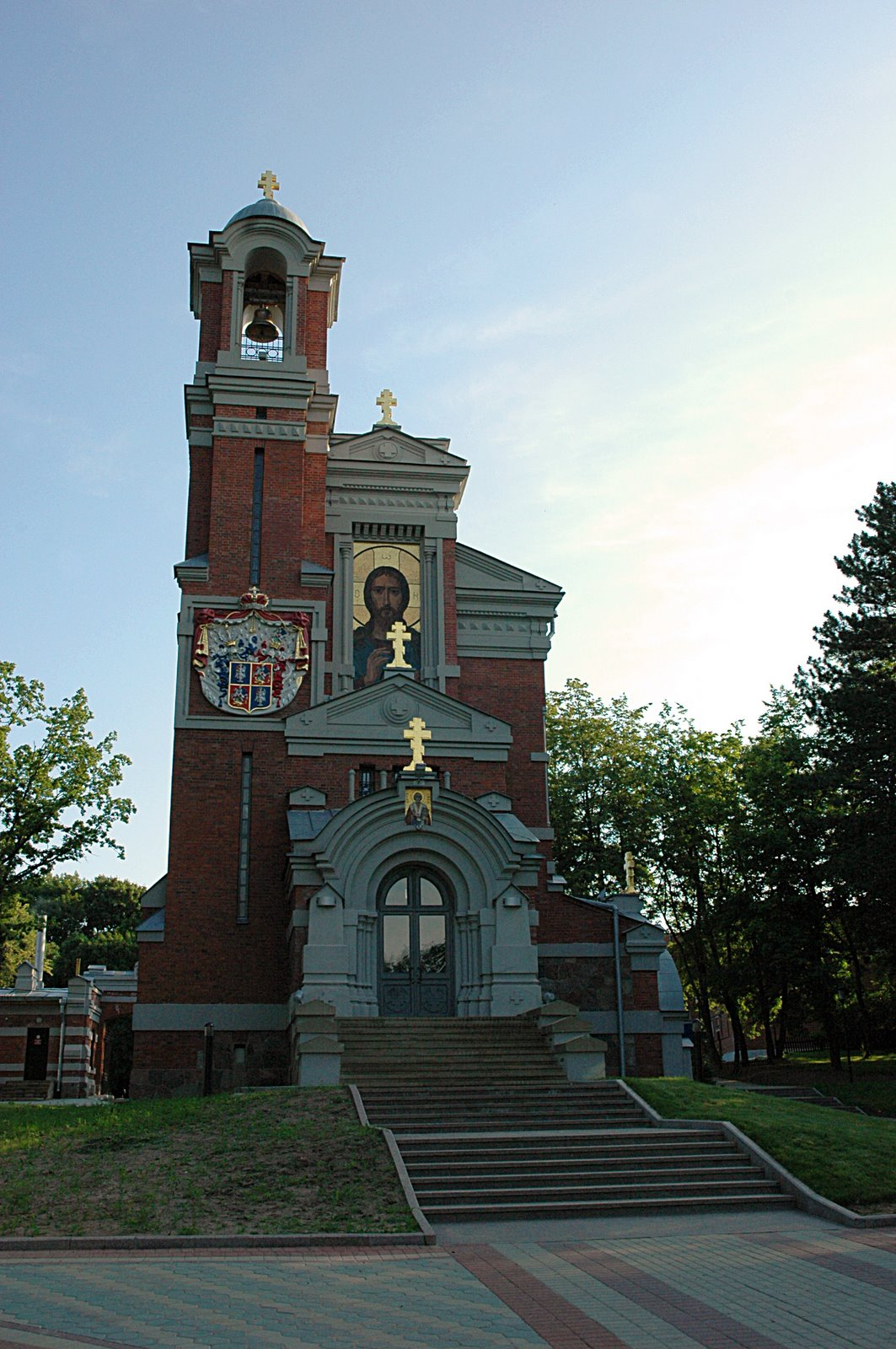 Мирский замок